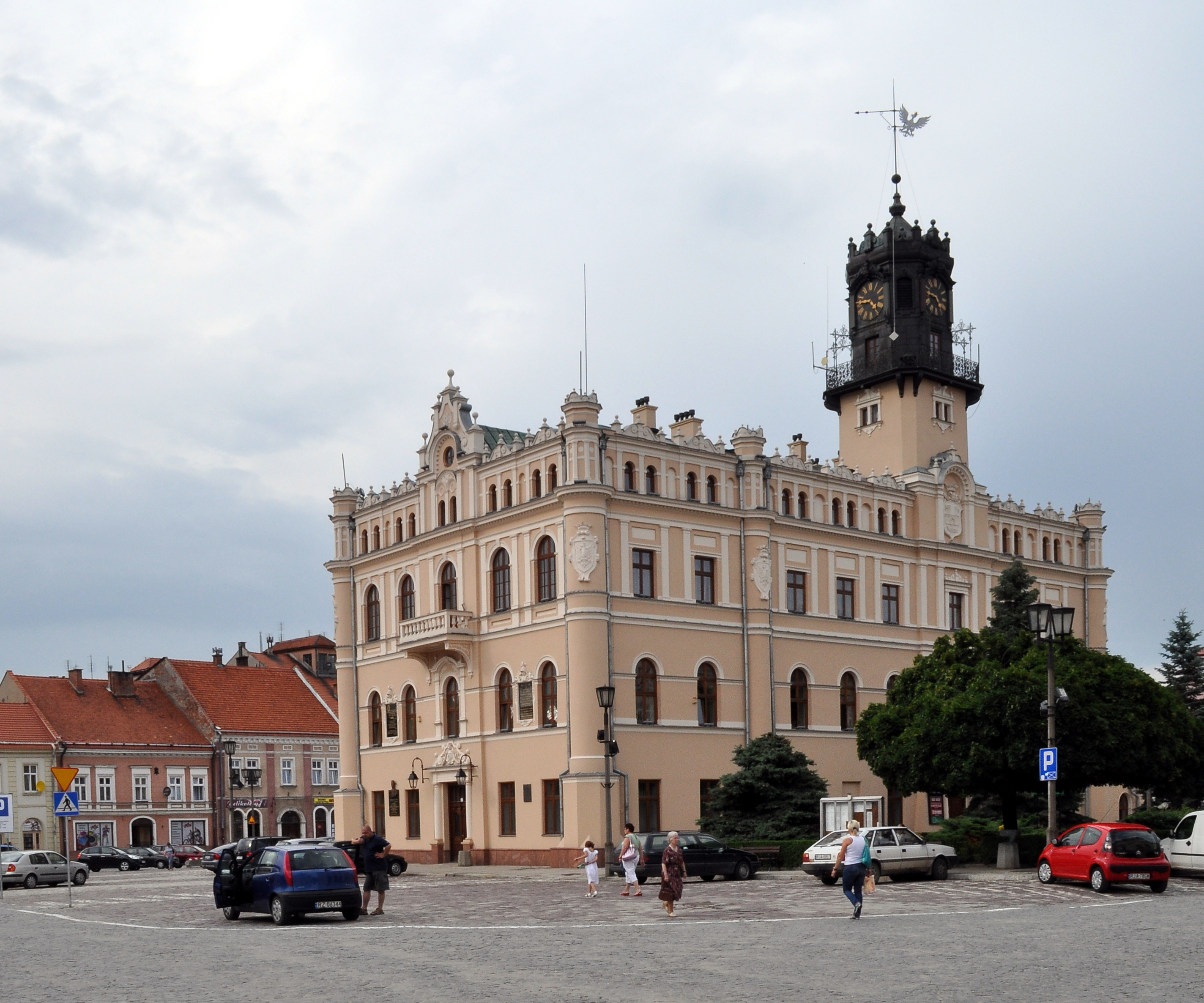 ratusz, Jarosław, Rynek 1